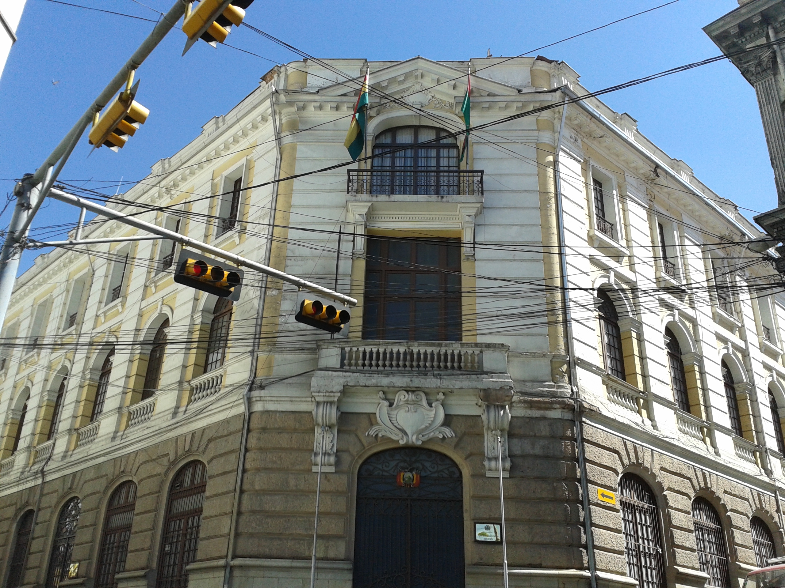 Biblioteca Banco Central de Bolivia This medium shows the protected monument with the number L/00-058 in Bolivia.